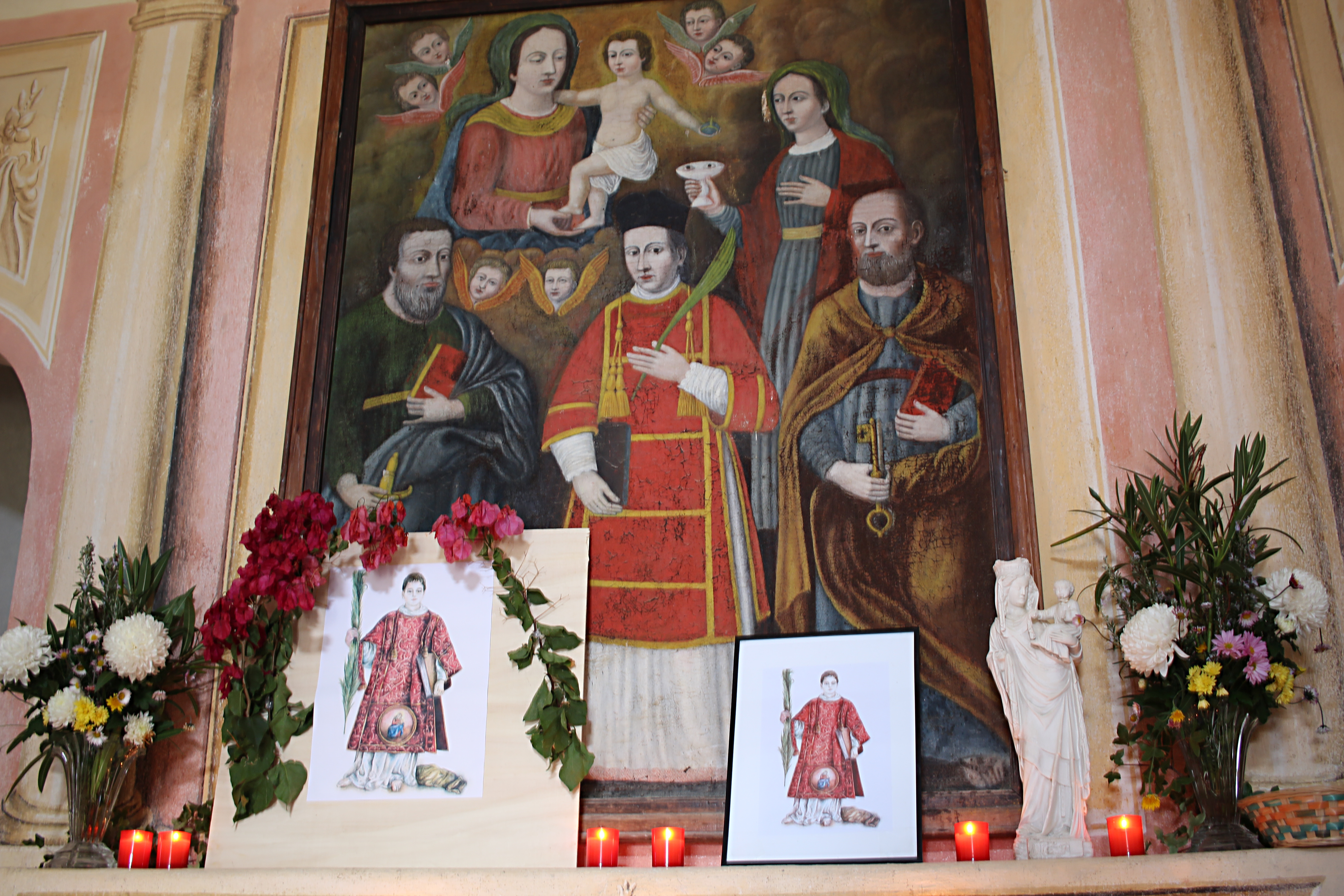 Altare della Chiesa di San Cesario diacono e martire in Cateri (Corsica)